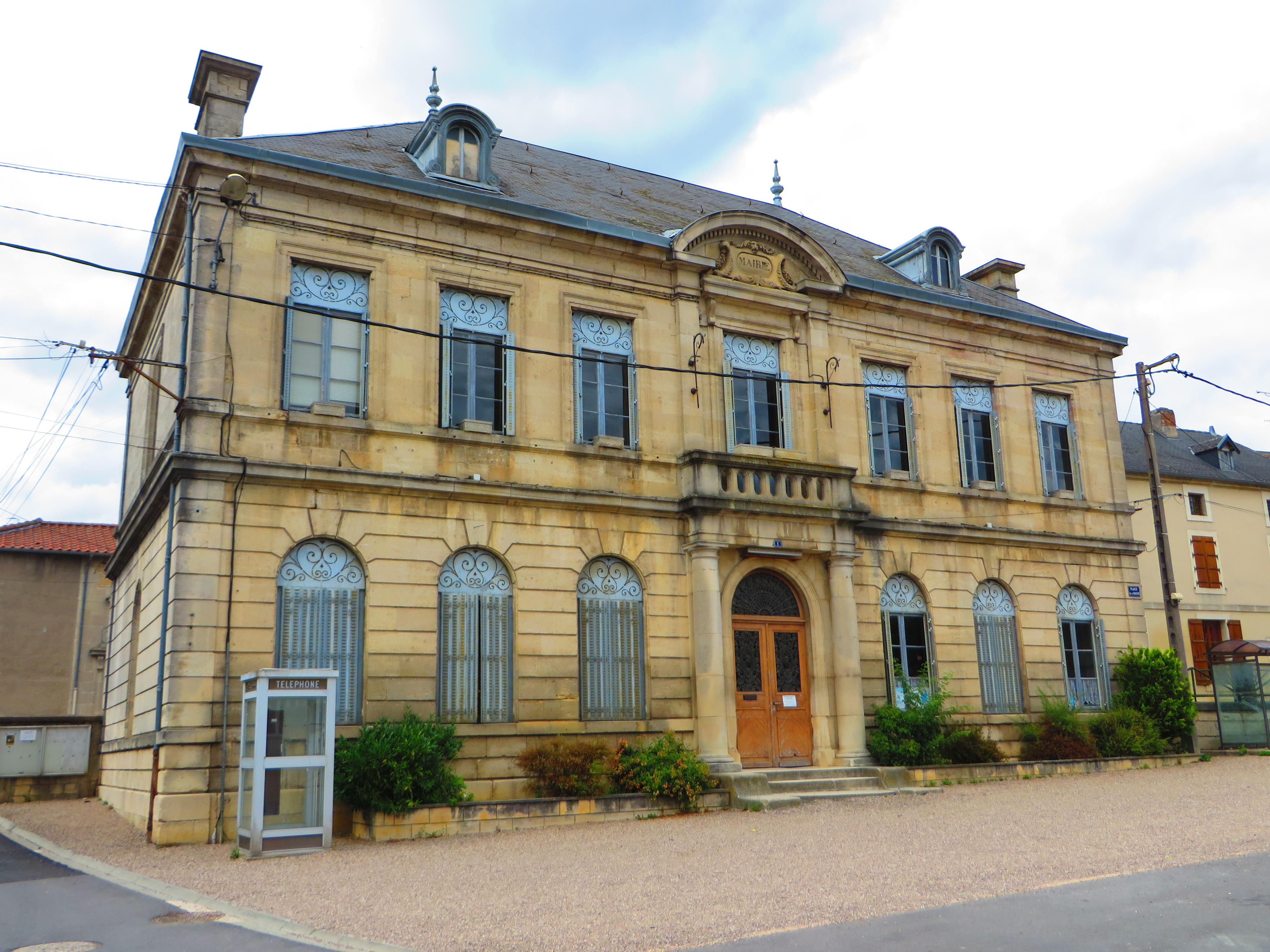 Sommedieue La mairie